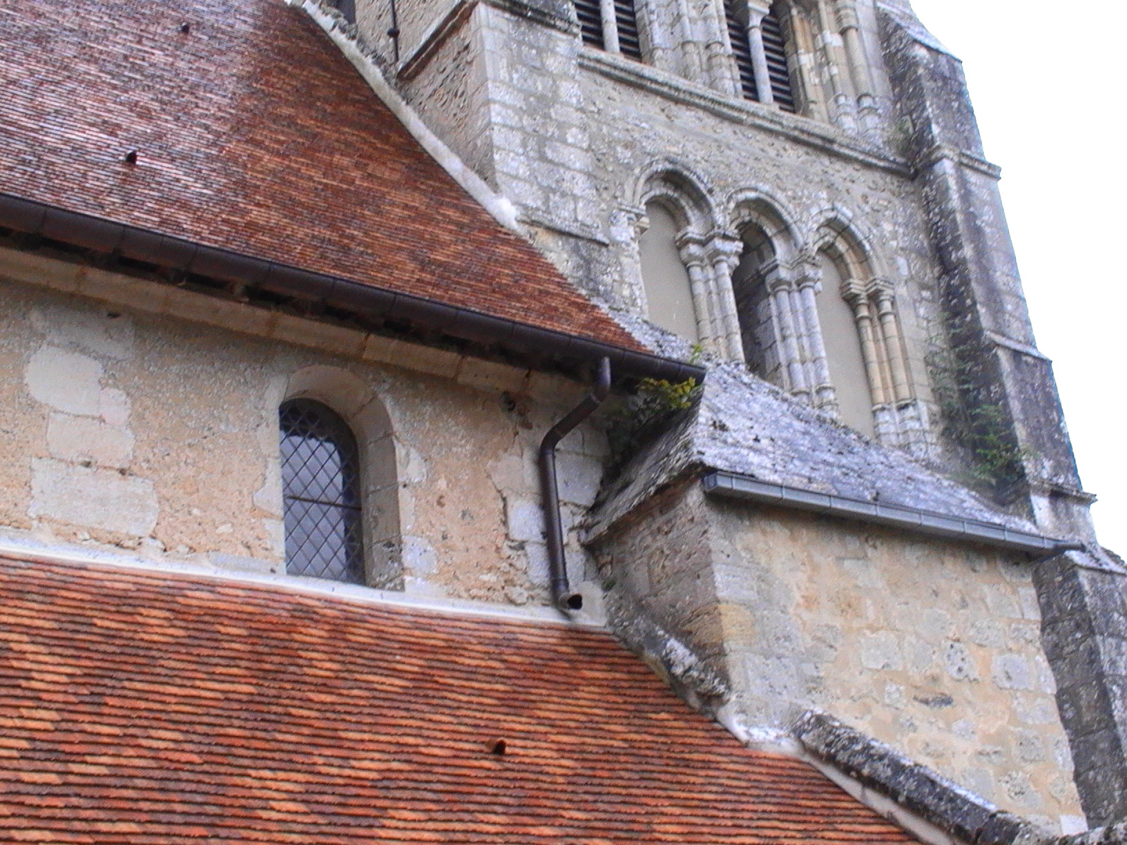 Eglise Saint-Georges d'Aubevoye - détail de la tour-clocher